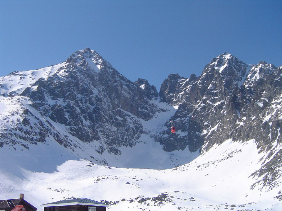 Lomnicky stit (left), Kezmarsky stit (middle) and Huncovsky stit (right) from Skalnate pleso